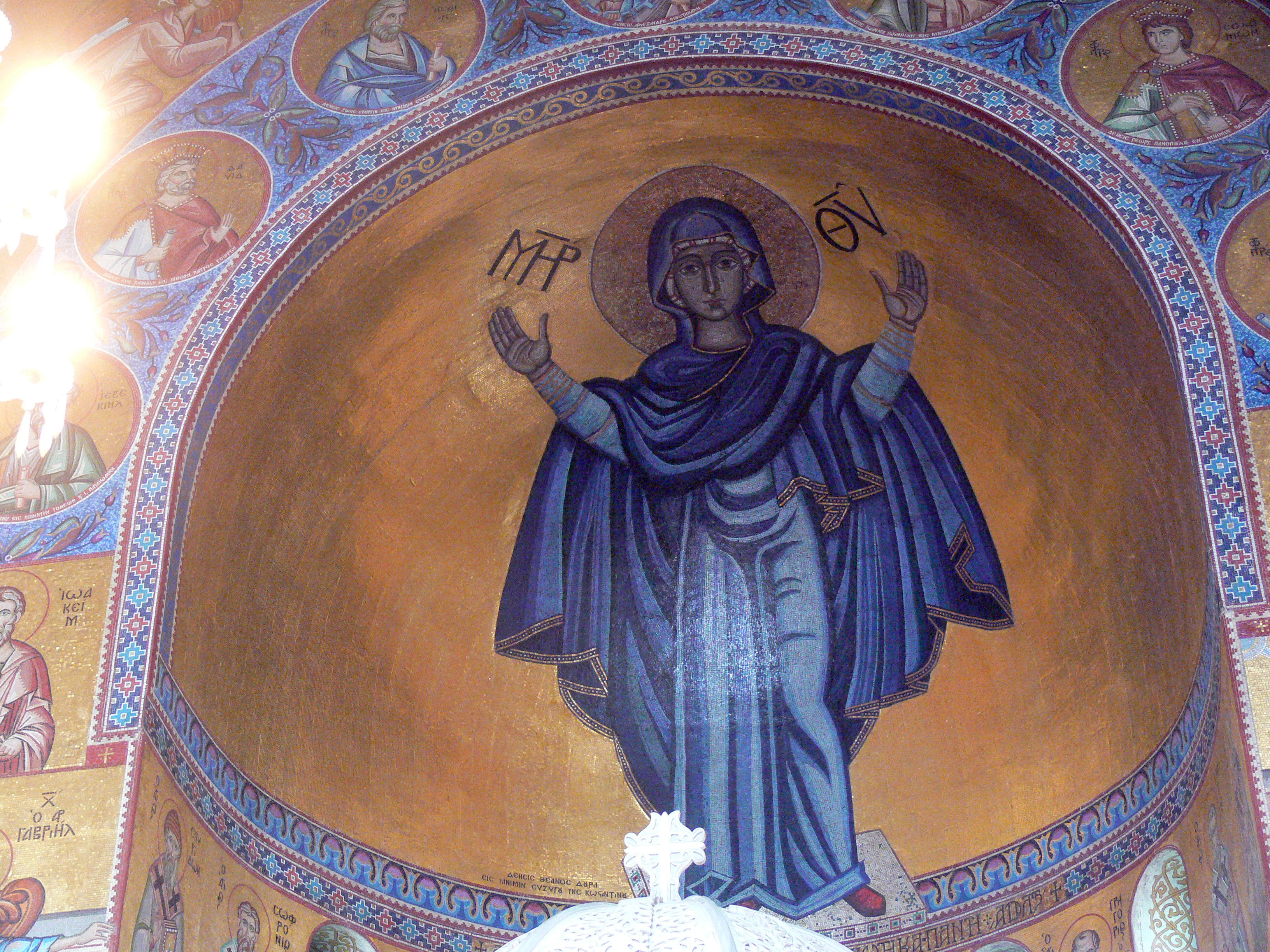 Volos. Basilika